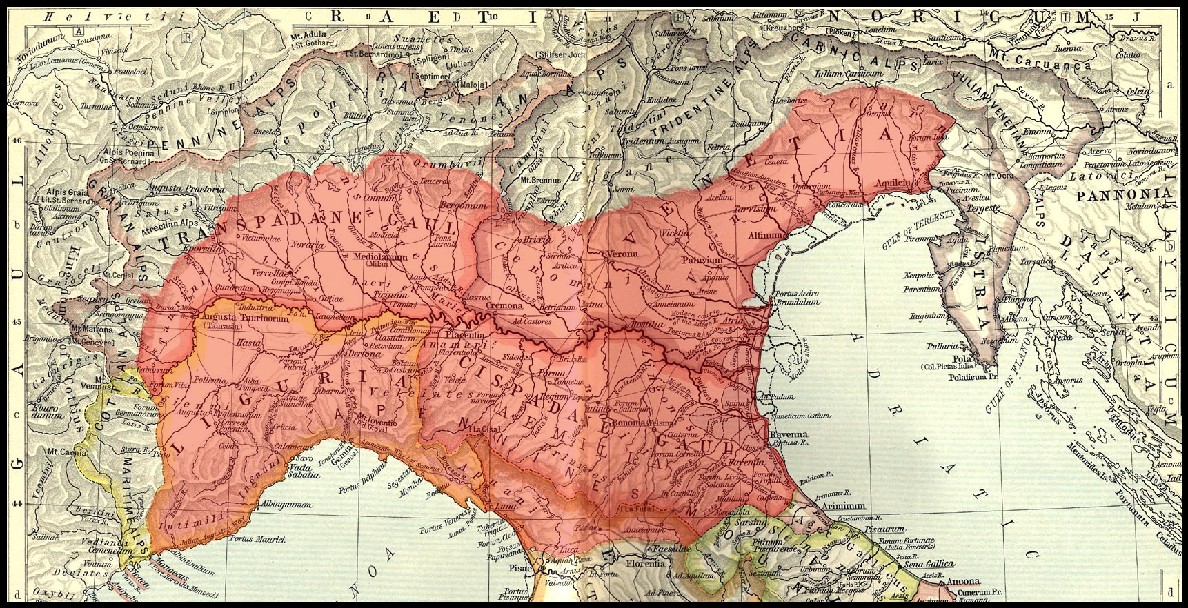 Territori della Gallia cisalpina attorno agli inizi del I secolo a.C. Historical Atlas by William R. Shepherd, 1911. Courtesy of the University of Texas Libraries, The University of Texas at Austin. From The Historical Atlas by William R. Shepherd, 1911 edition